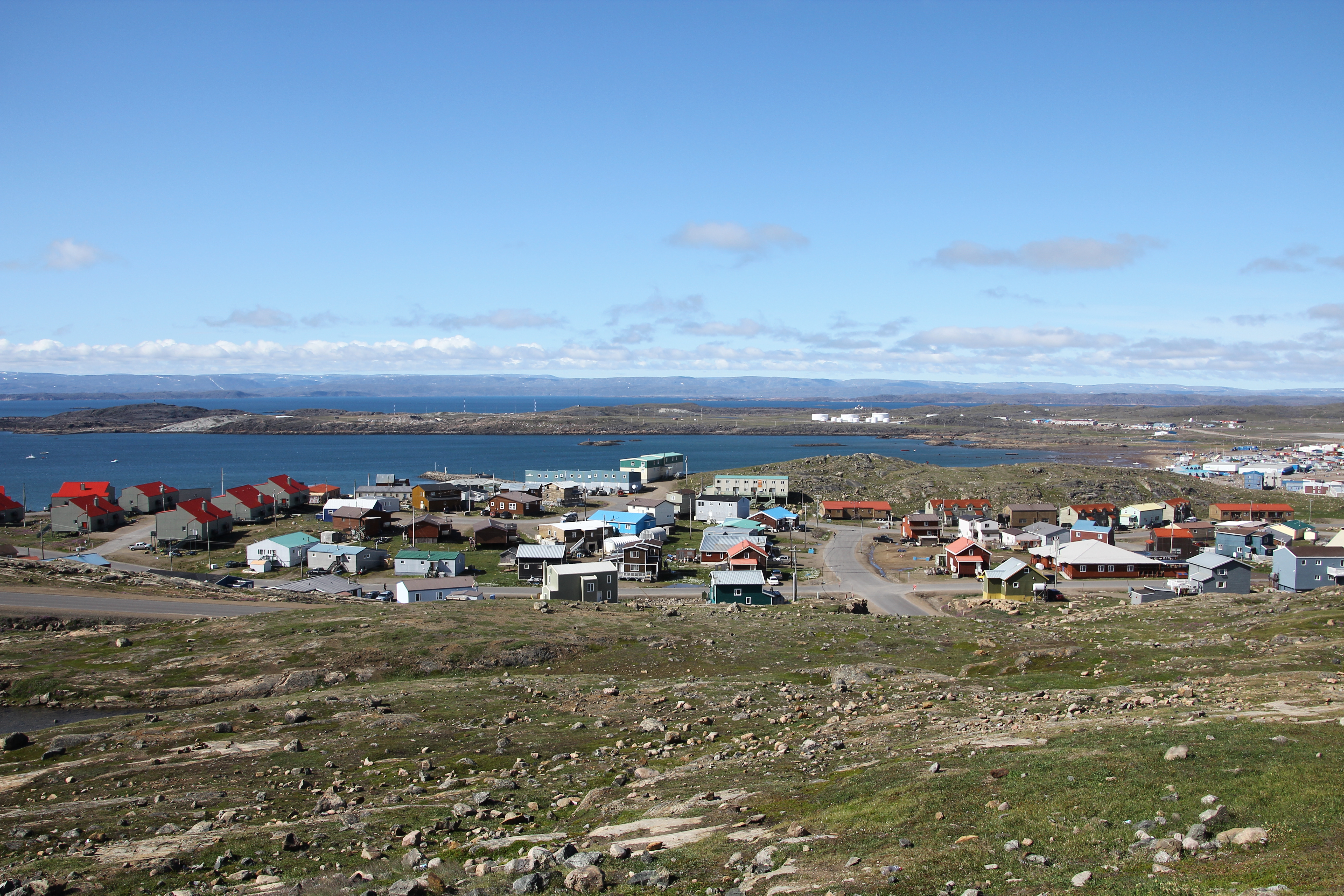 Blick auf das Frobisher Bay in Iqaluit